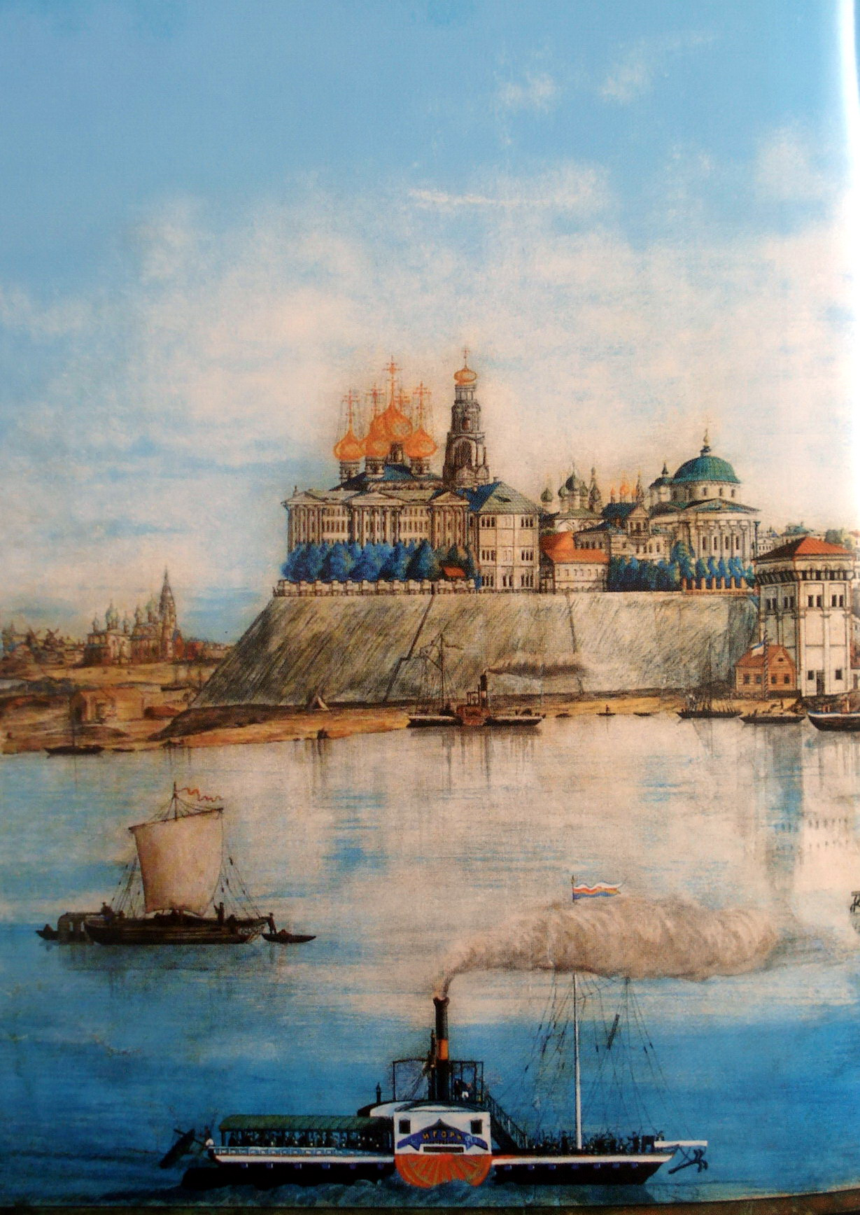 Ярославль. Стрелка. Г.П. Сабанеев. 1878. Ярославль. Ярославский музей-заповедник.